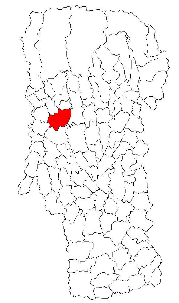 Categorie:Hărţi ale judeţului Argeş